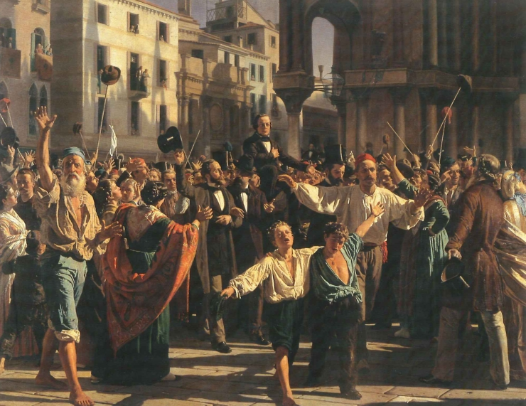 Daniele Manin e Nicolò Tommaseo dopo la loro liberazione dalle carceri austriache a seguito della sollevazione popolare di Venezia del 1848